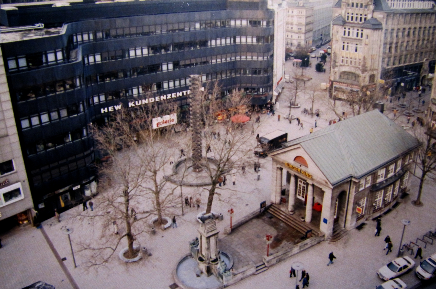 Mönckebergbrunnen Hamburg (1997) am Mönckebergplatz; rechts die ehemalige Bibliothek, mittig die Brunnensäule von Hermann Goepfert, oben das Kundenzentrum der HEW und die Landesbankpassage. Brunnensäule, Kundenzentrum und Passage wurden in den 2010er-Jahren abgerissen.